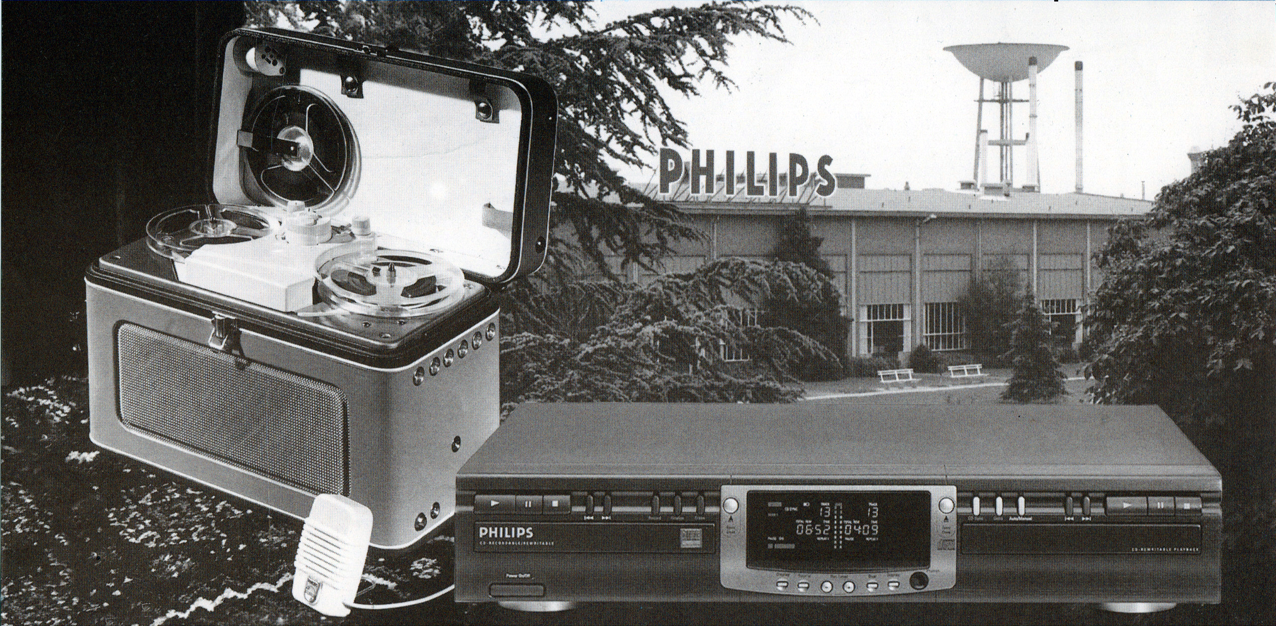 Fotomontage die het bedrijf Philips in Hasselt en zijn producten weergeeft